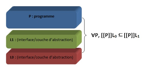 Illustration du raffinement contextuel